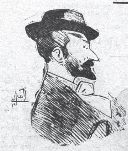 Künstlerkarikatur, Teil eines Kohlenstiftzyklus für die griechische Literaturzeitung Estia